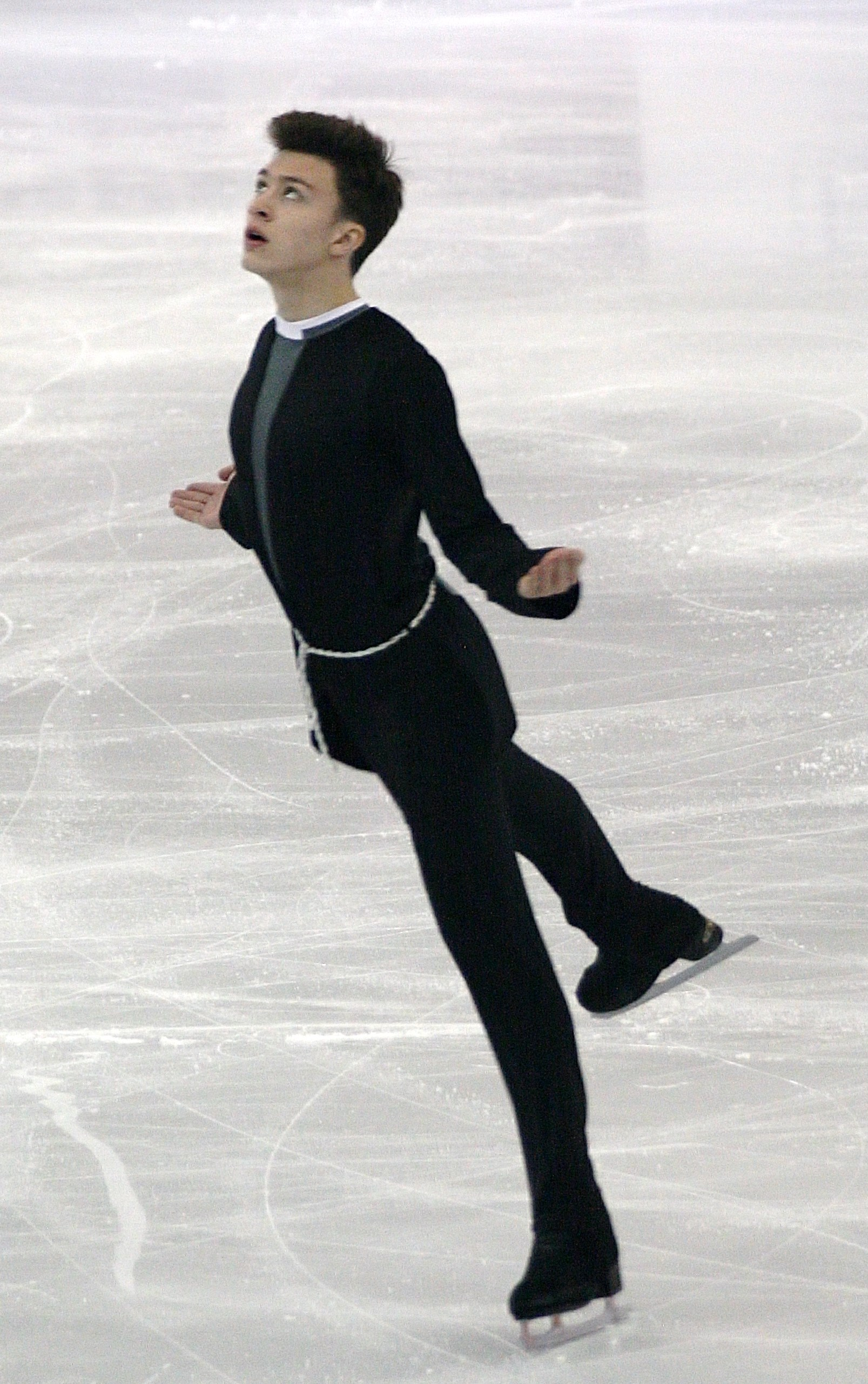 Дмитрий Алиев (Россия) на финале Гран-при по фигурному катанию среди юниоров 2015-2016.